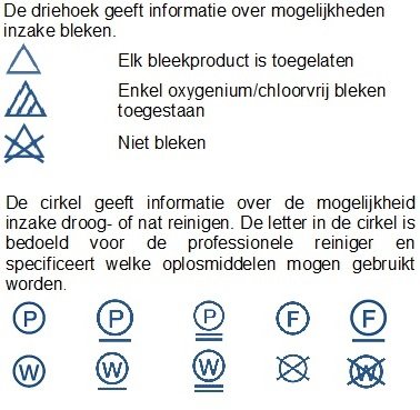 bleek symbolen en prof. reinigingssymbolen